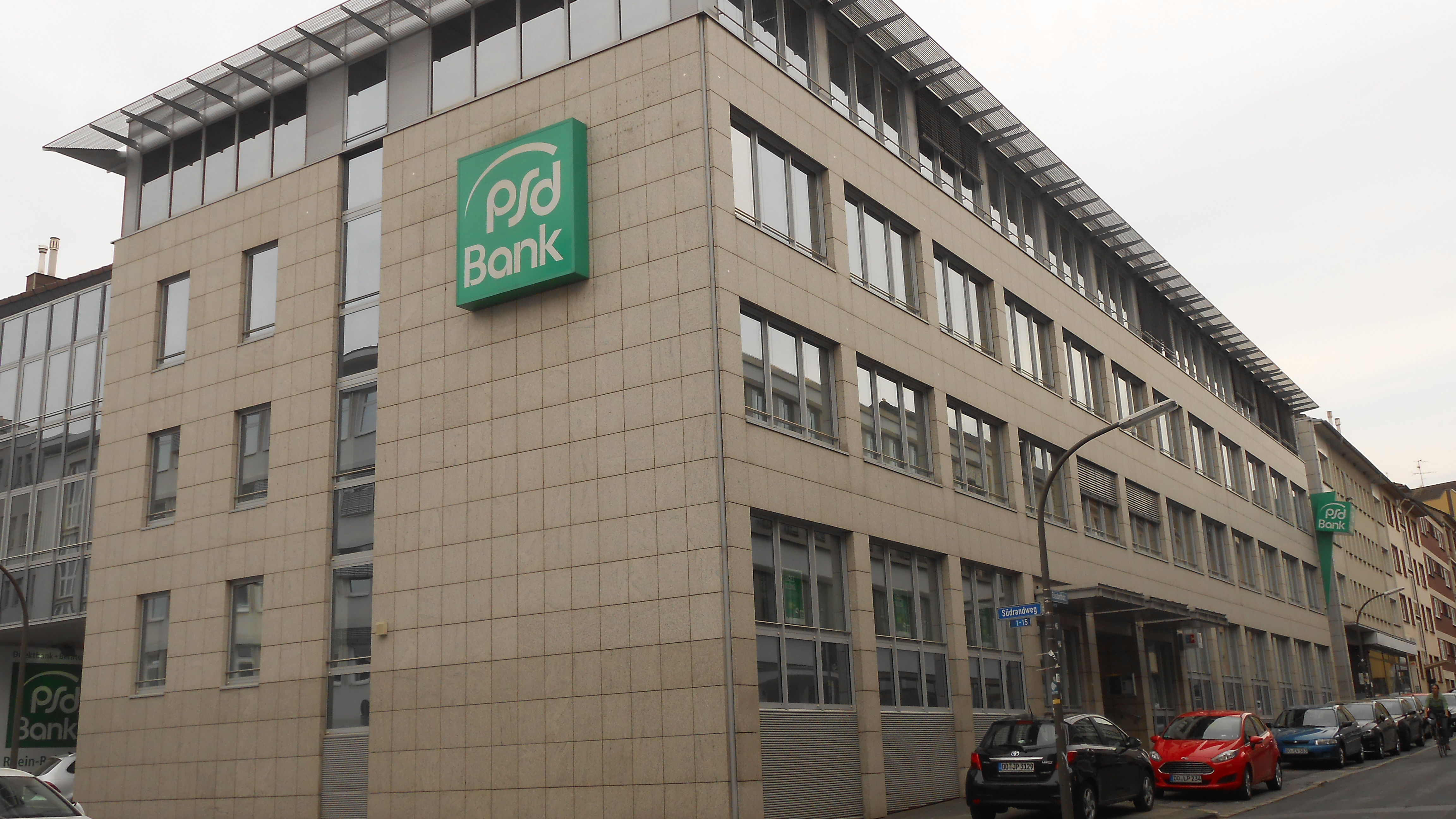 Das Gebäude der PSD Bank Rhein-Ruhr eG in Dortmund, in der Elisabethstraße (am Südwall).